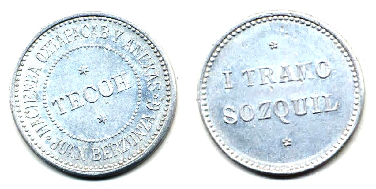 Ficha por 1 Tramo de Sosquil de la Hacienda Oxtapacab, Yucatán.